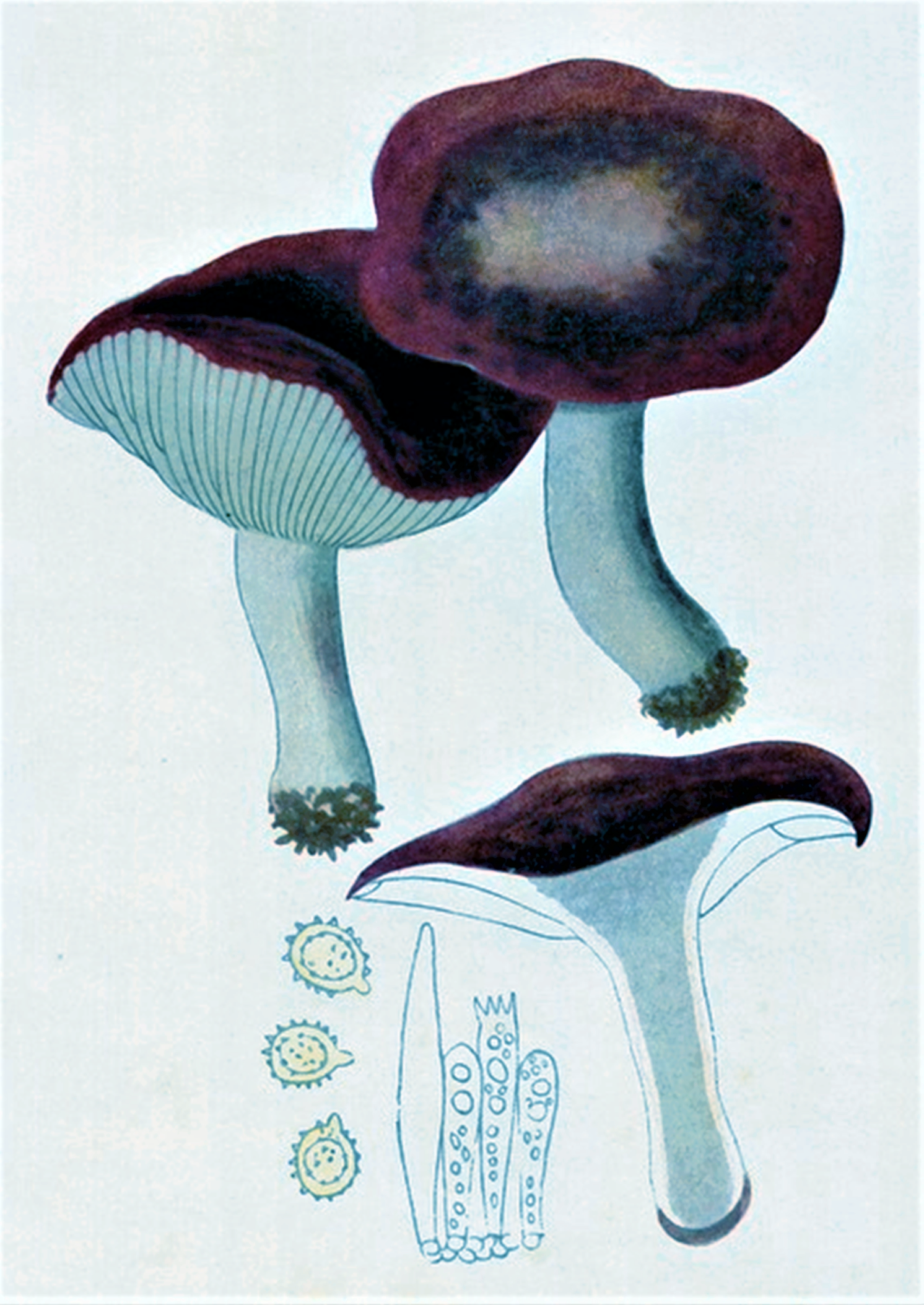 Giacomo Bresadola: Russula depallens (Pers. : Fr. (1838) als Synonym zu Krombholz’ Agaricus atropurpureus von 1845 (S. 409), heute gehörig zu Russula atropurpurea (Krombh., 1845) Britzelm. (1893)